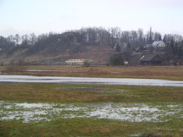 Mielnik (woj. podlaskie) Góra Zamkowa 1